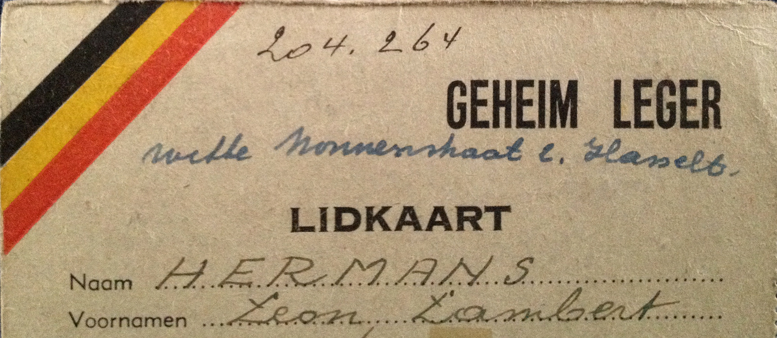 Lidkaart van het Geheim Leger, Belgische weerstand